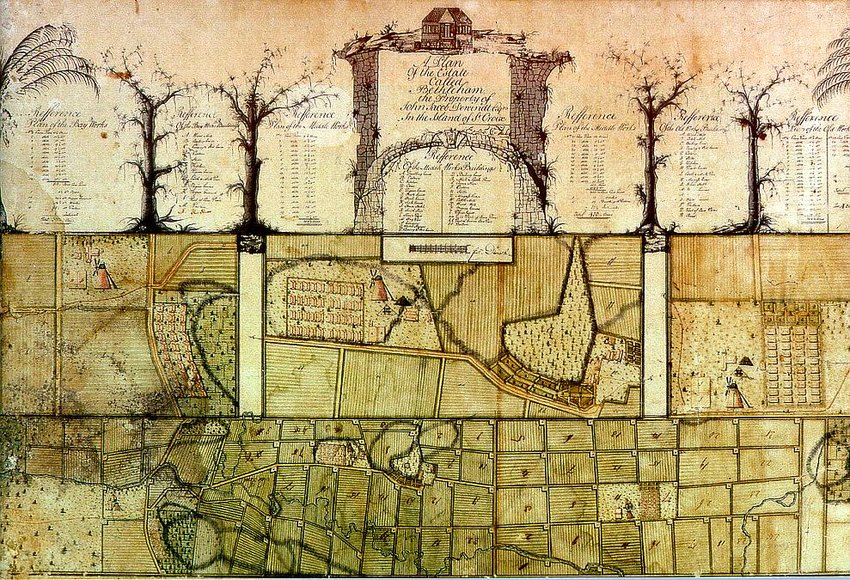 Estate Bethlehem on a map of 1779 by the military surveyor F. C. von Meley